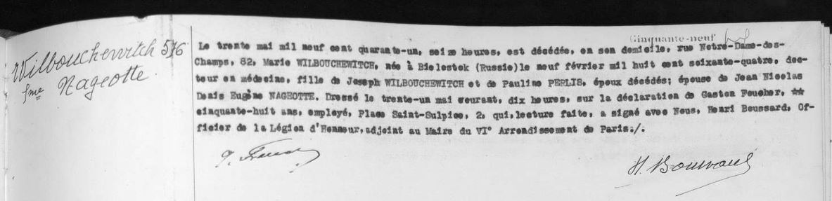 1941.05.30 - Paris 06 - Acte de décès de Marie Wilbouchewitch épouse Nageotte